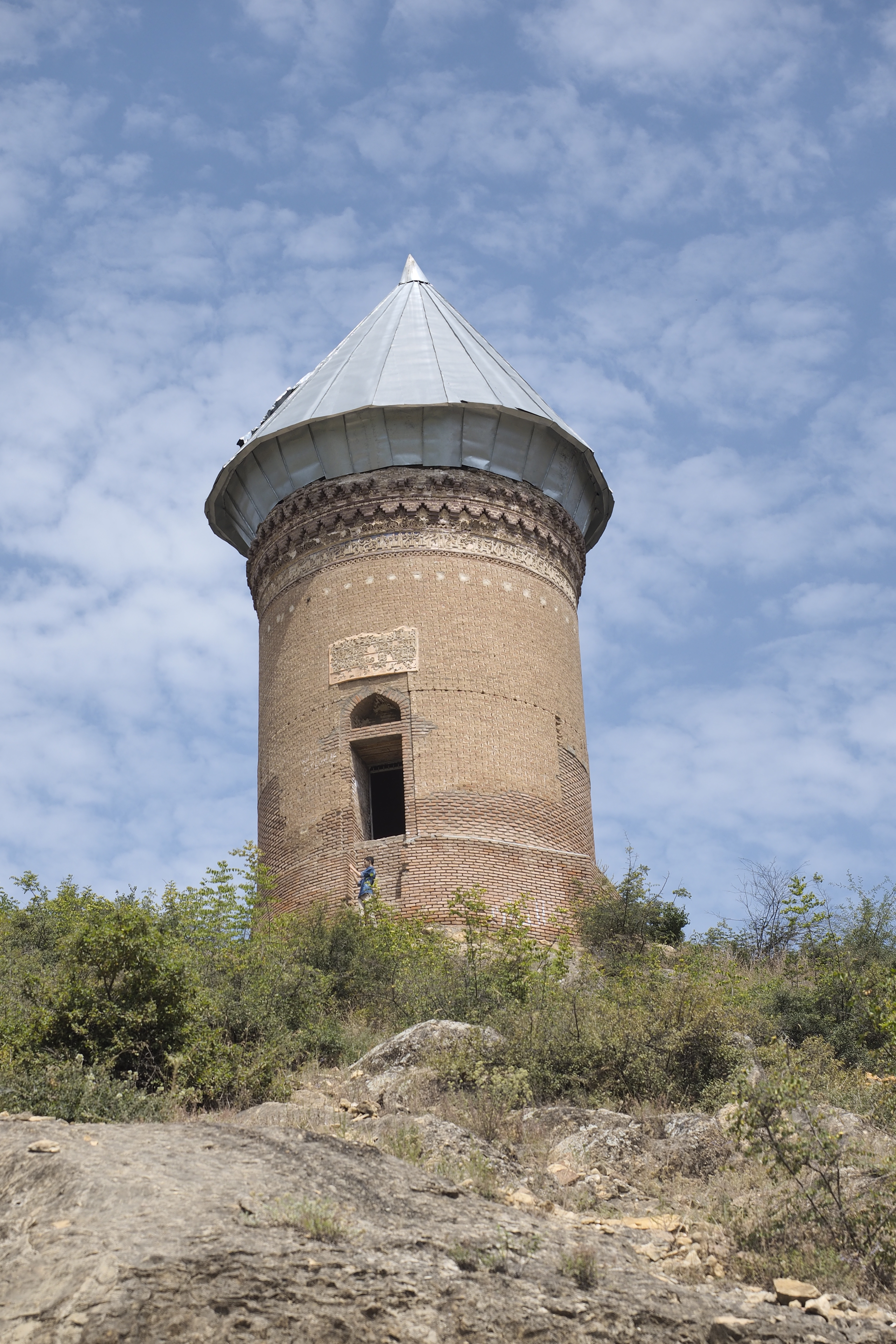 برج رسکت